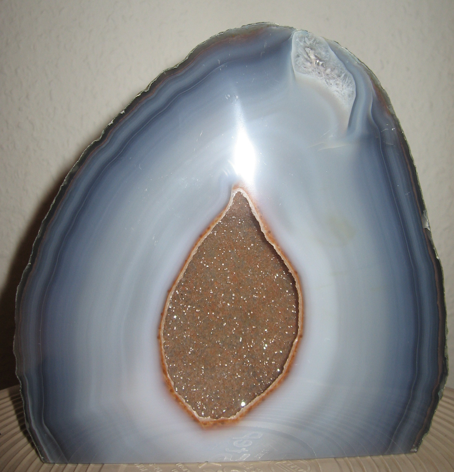 Achatdruse mit grauen Quarzkristallen